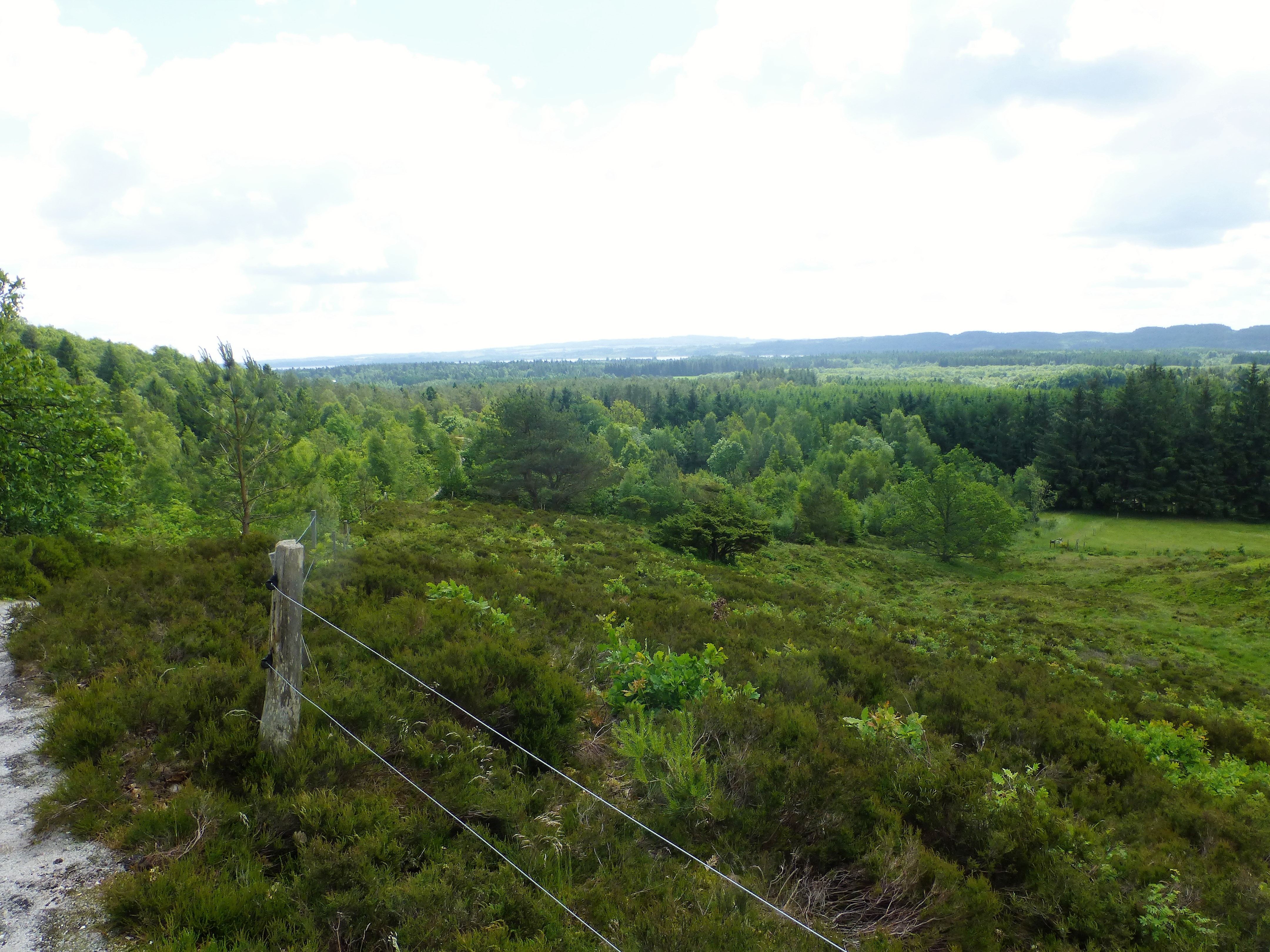 Lyngbakkerne ved Gammel Rye det mod syd